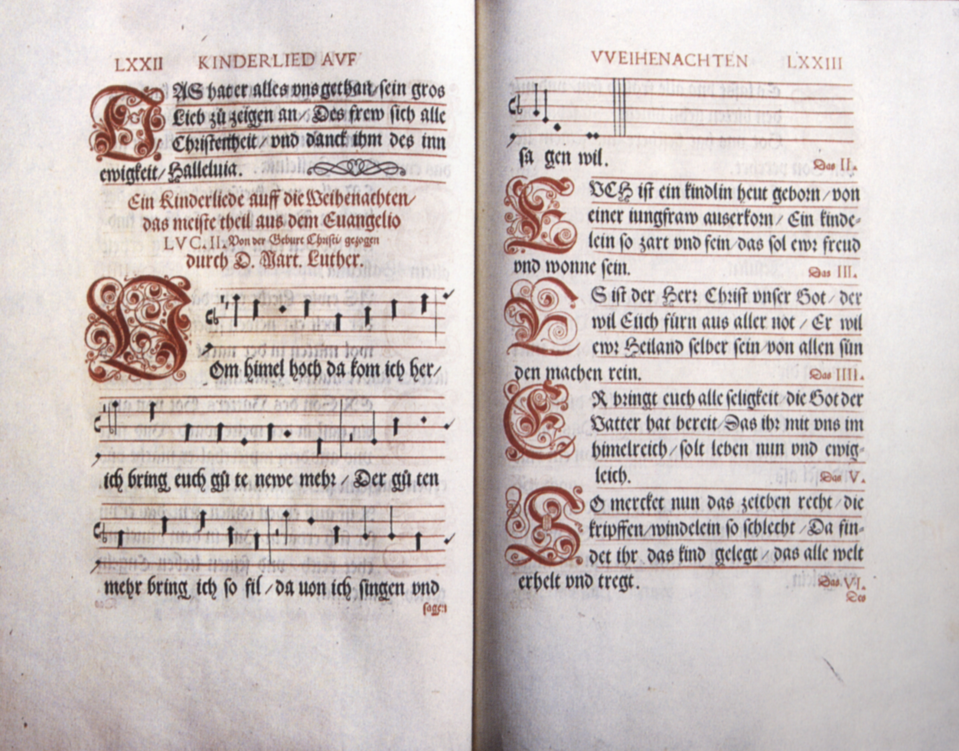 Aus dem Straßburger Gesangbuch 1541: "Kinderliede auff die Weihenachten" (Vom Himmel hoch) (Prädikantenbibliothek Isny, Theol. 255)